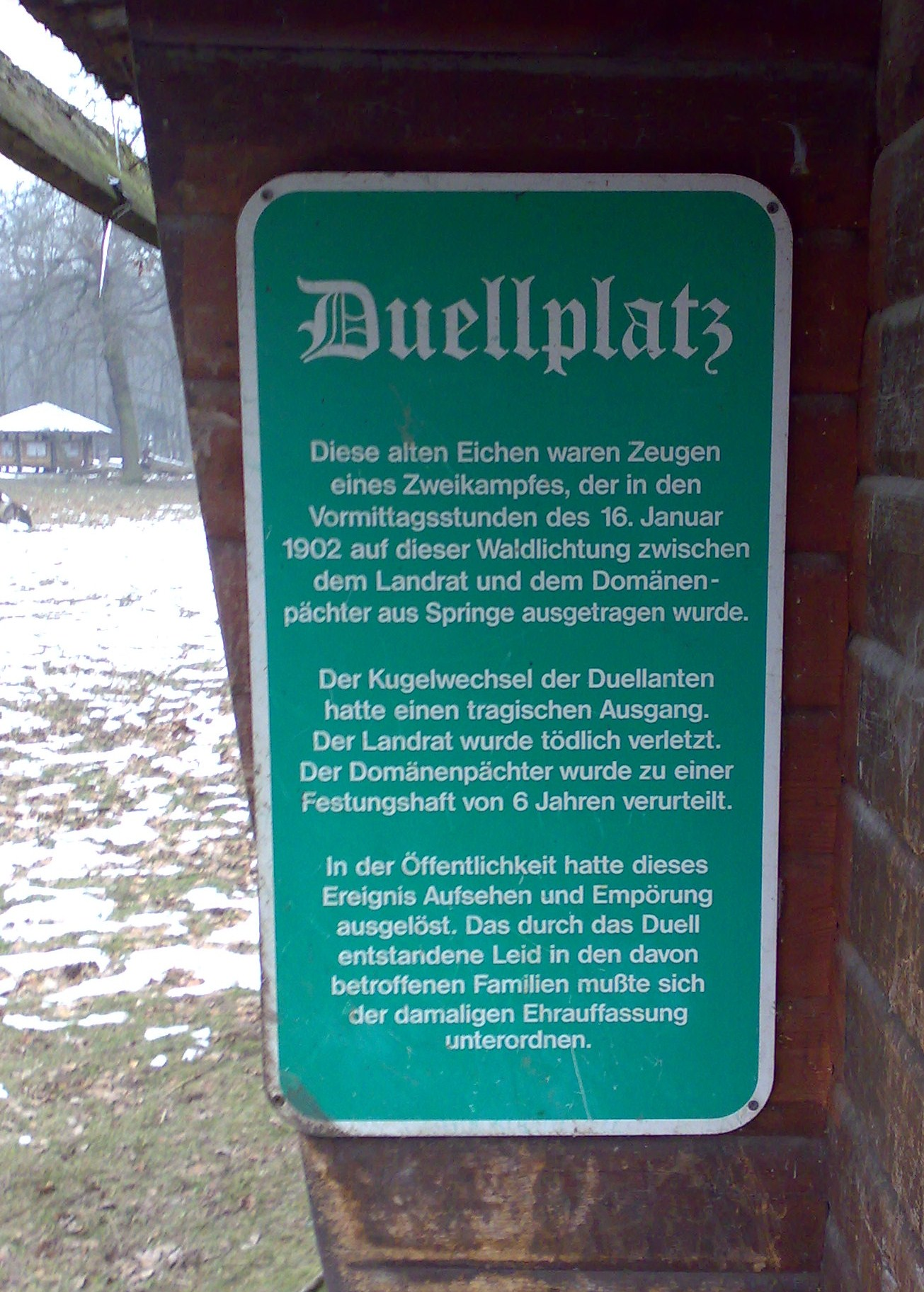 Hinweis und Erläuterungsschild auf dem Duellplatz im Saupark Springe.